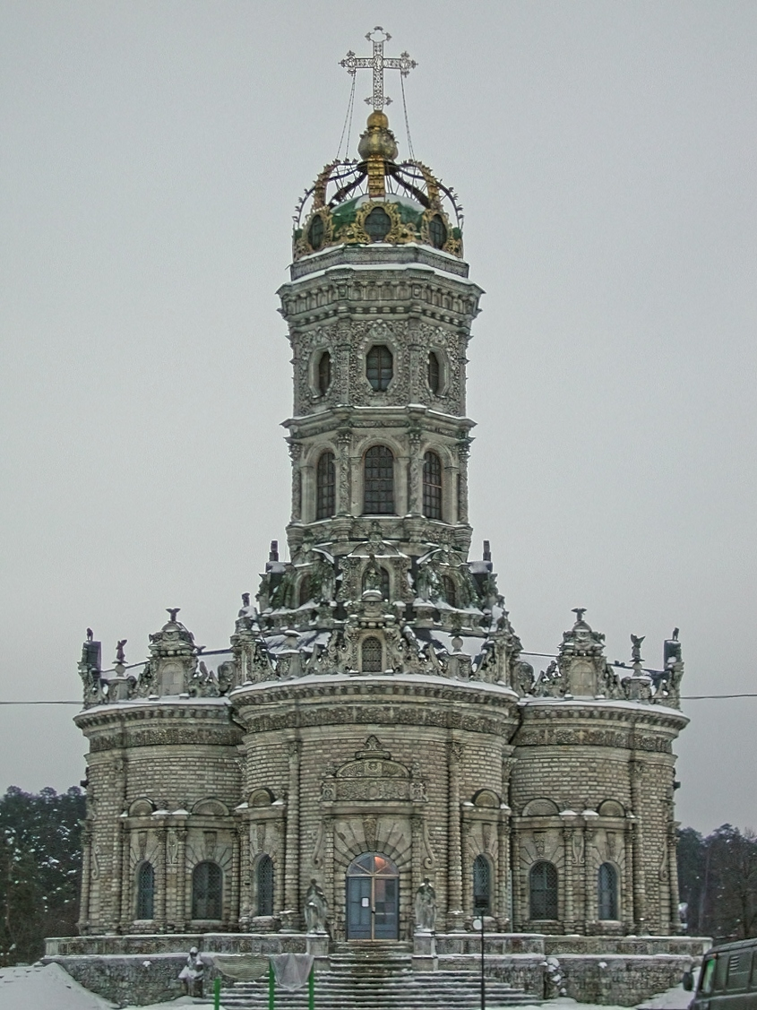 Церковь Знамения Пресвятой Богородицы в Дубровицах, построена в 1703 году